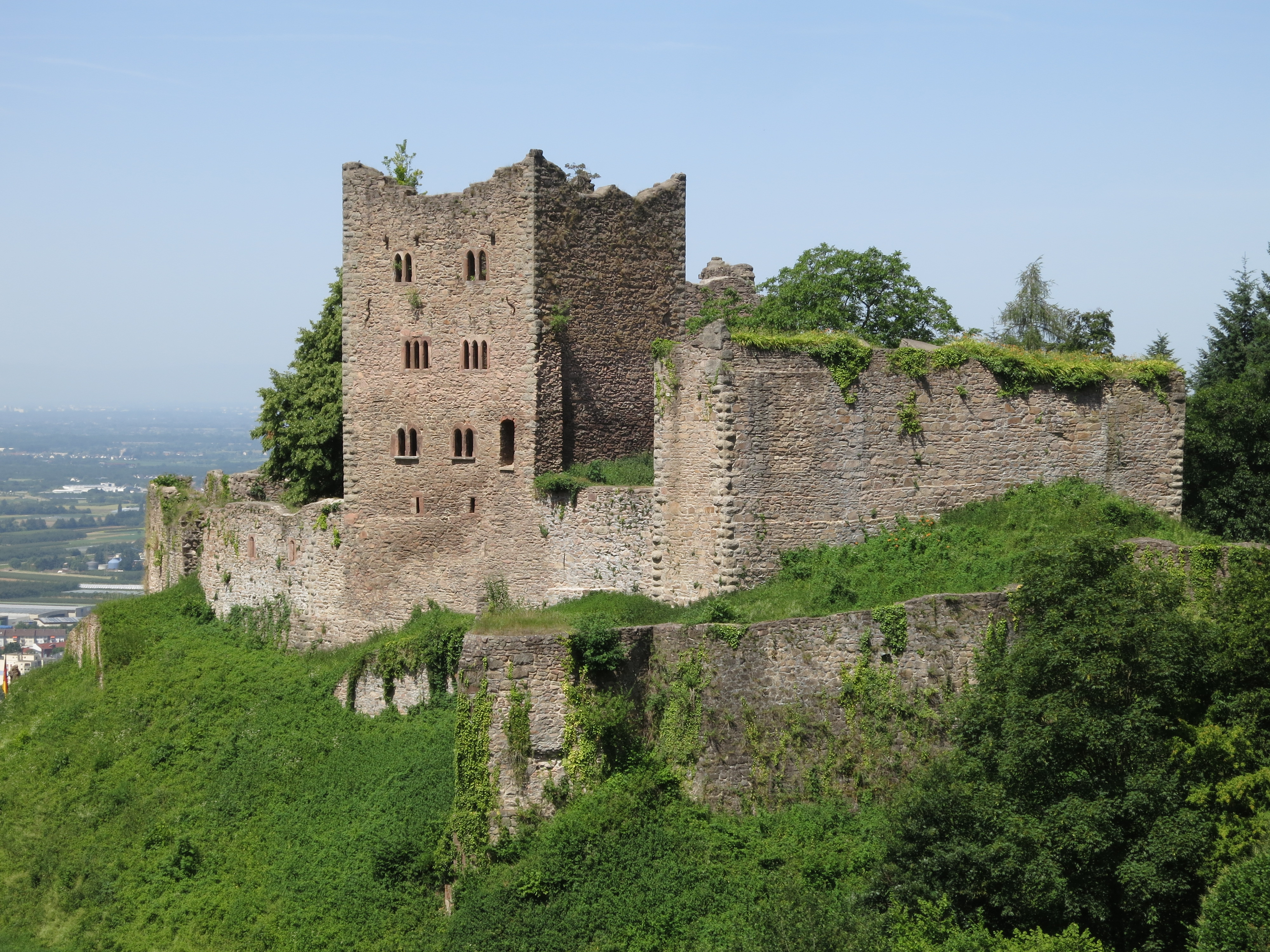 Ruine Schauenburg bei Oberkirch.